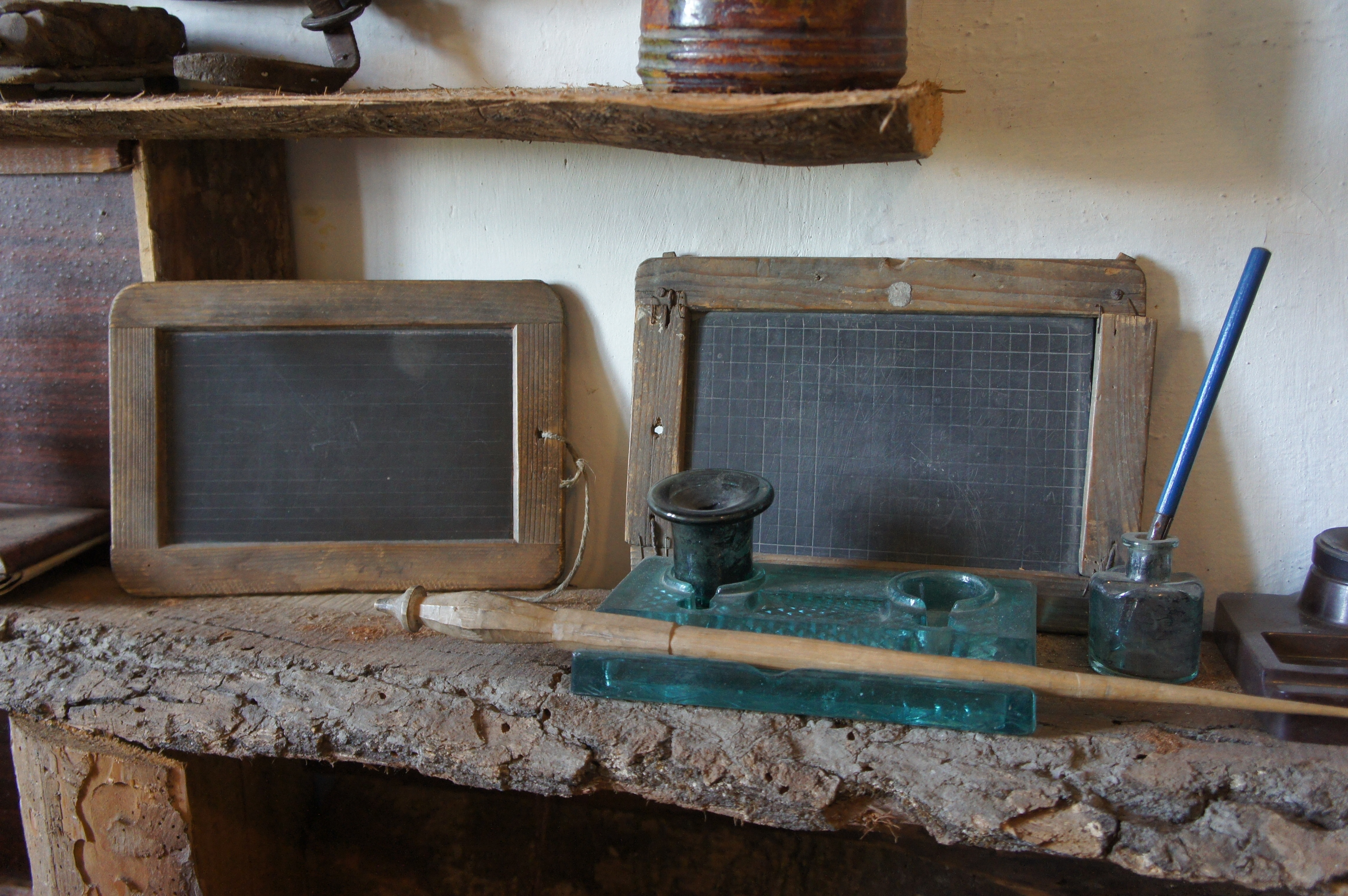 [15/16] Дощечки для писания в школе (Музей Береговщины) / Tablets for writing at school (Museum of Beregovshiny)